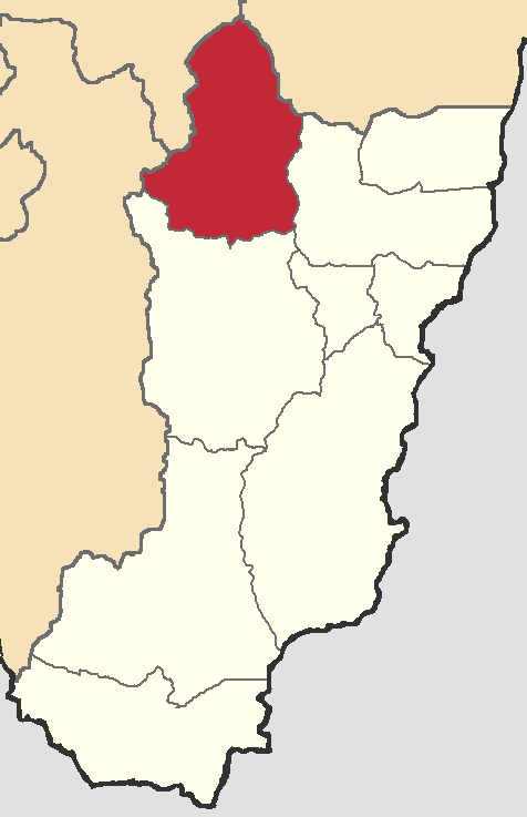 Mapa localizador del cantón en Zamora Chinchipe, Ecuador